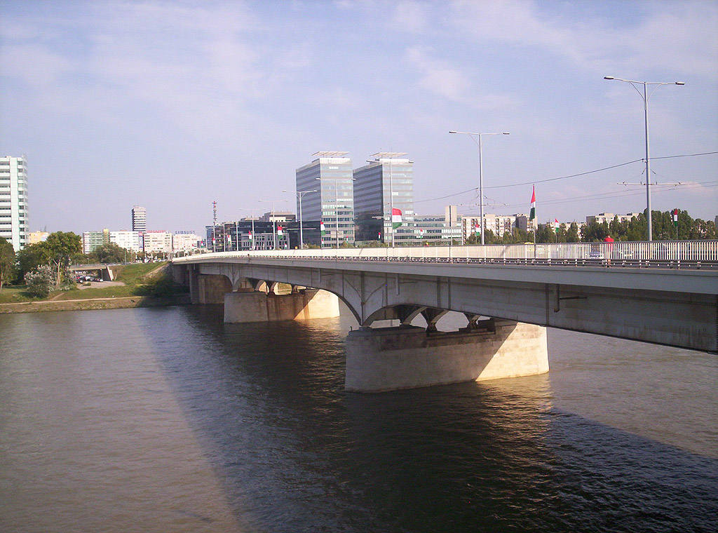 Budapest, Árpád híd